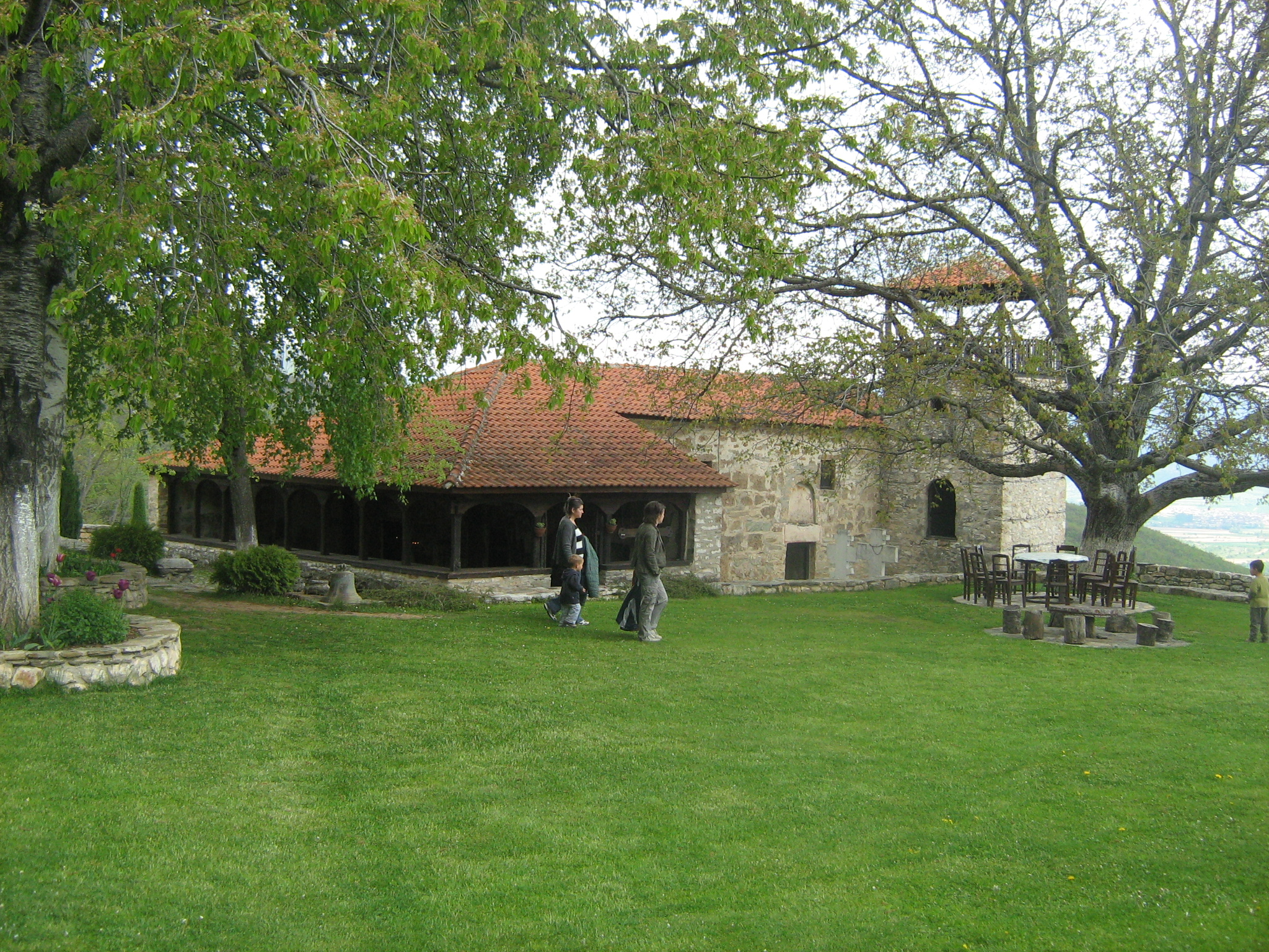 Црквата Св. Преображение во Манастрискиот комплекс Зрзе